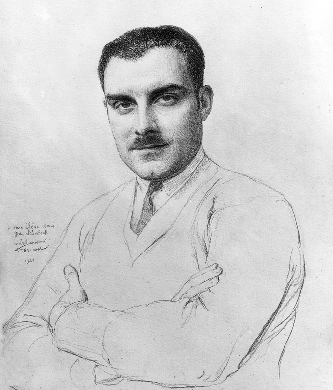 Portrait de Jean Scherbeck (1898-1989) par son maître et ami Emile Friant (1863-1932)